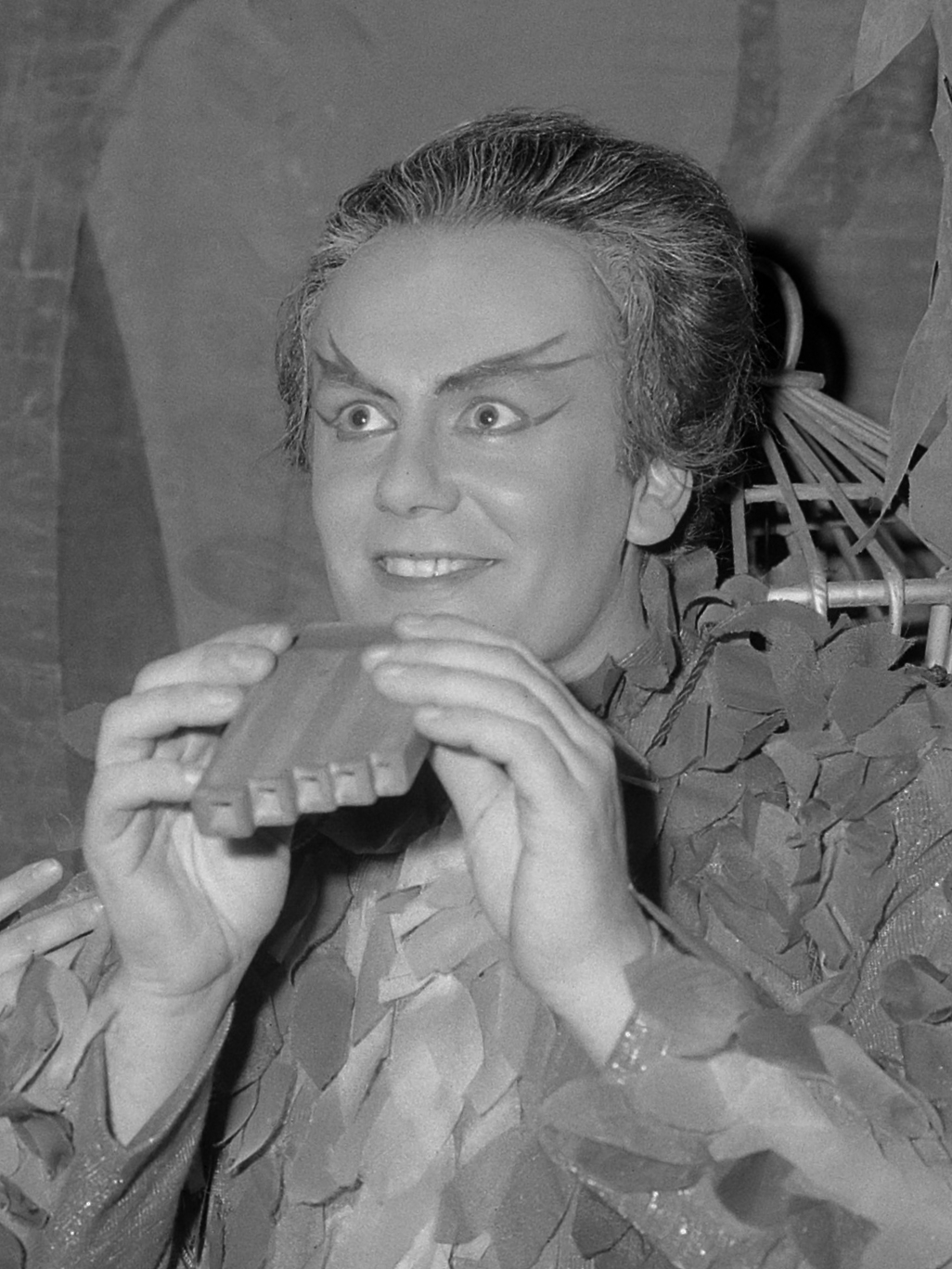 Els Bolkestein voor het eerst hoofdrol in de Zauberflote Els Bolkestein 16 december 1964